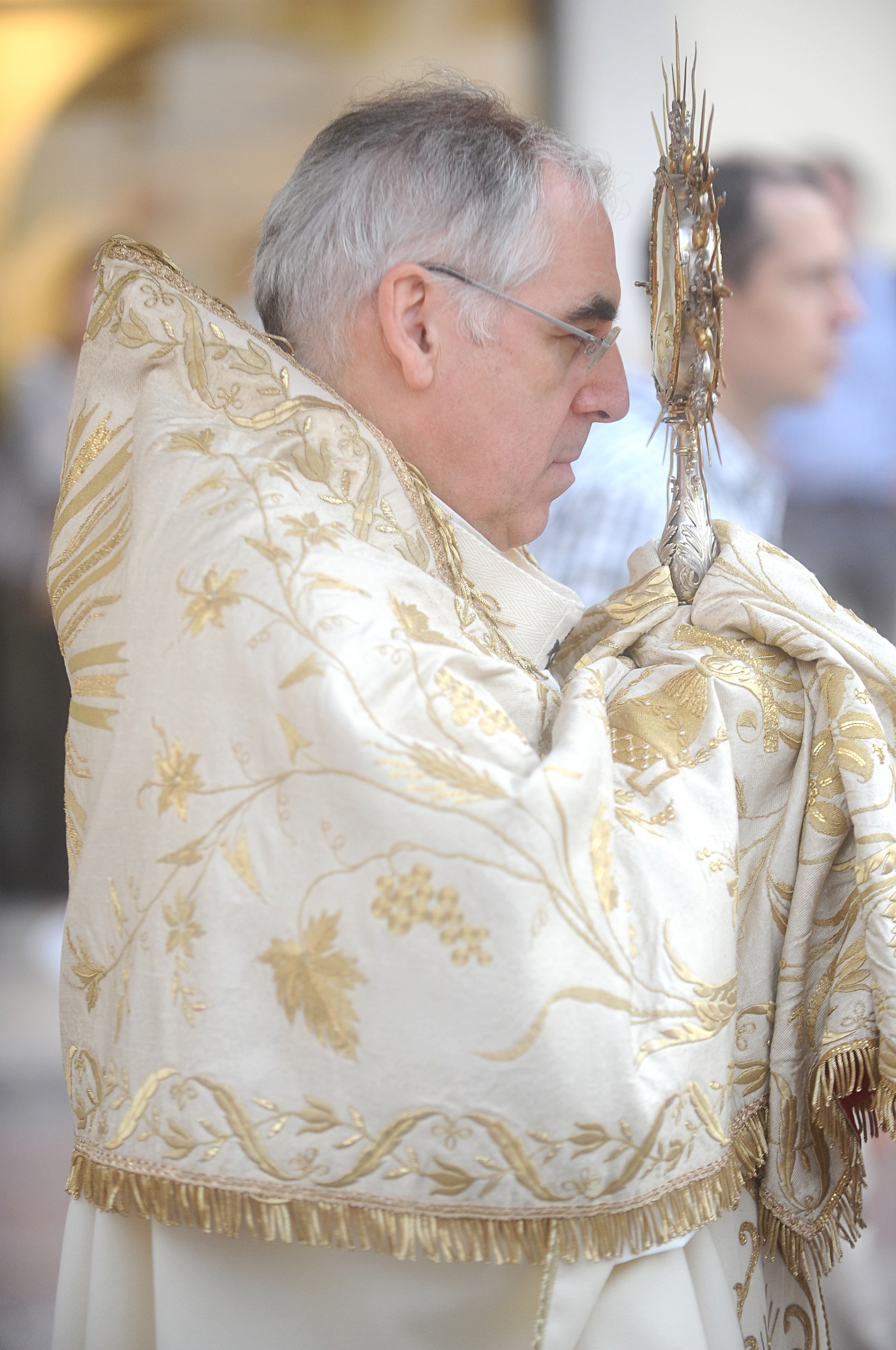 Lauro Tisi a Trento in occasione del Corpus Domini.